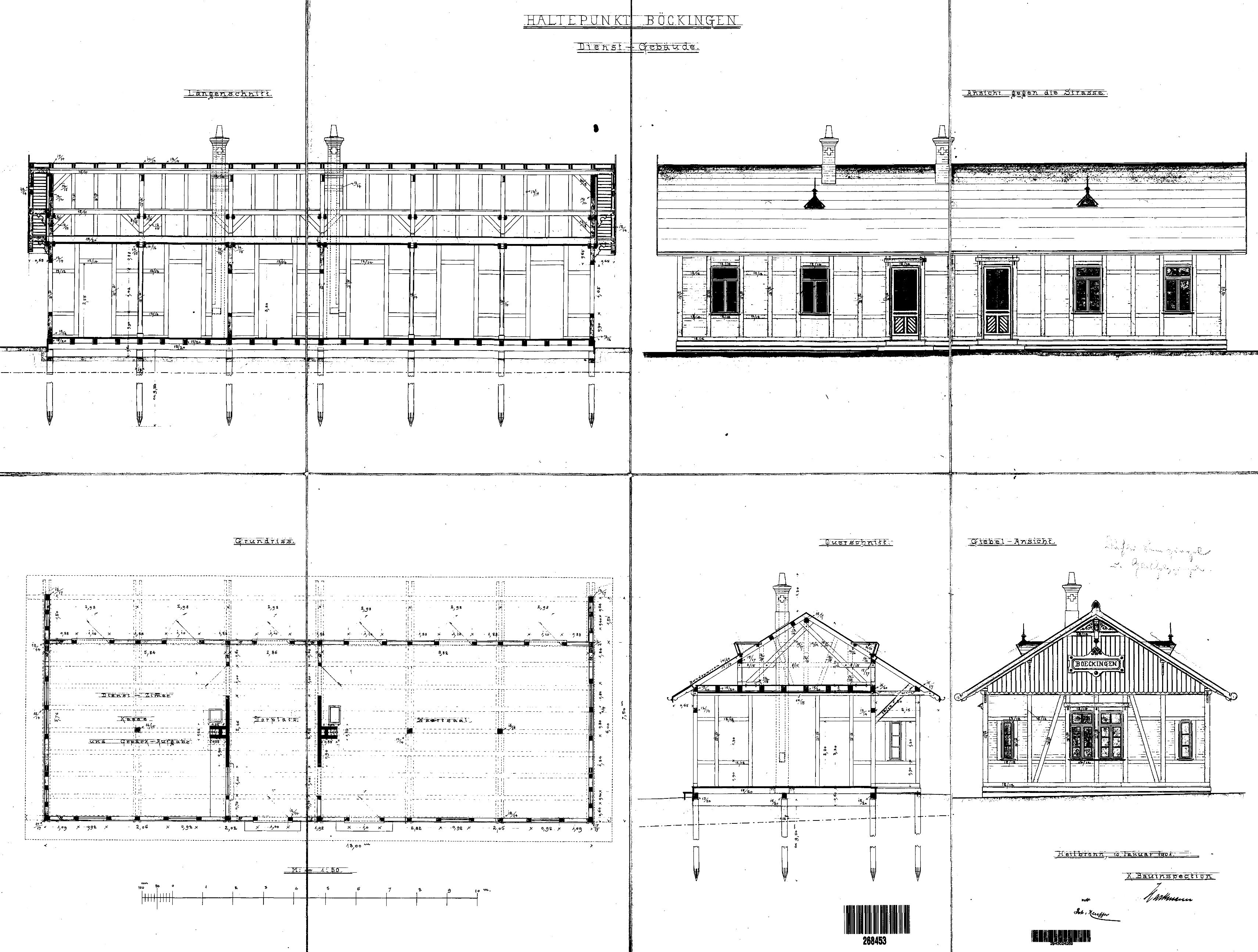 Dienstgebäude am Haltepunkt Böckingen, Plan von 1901